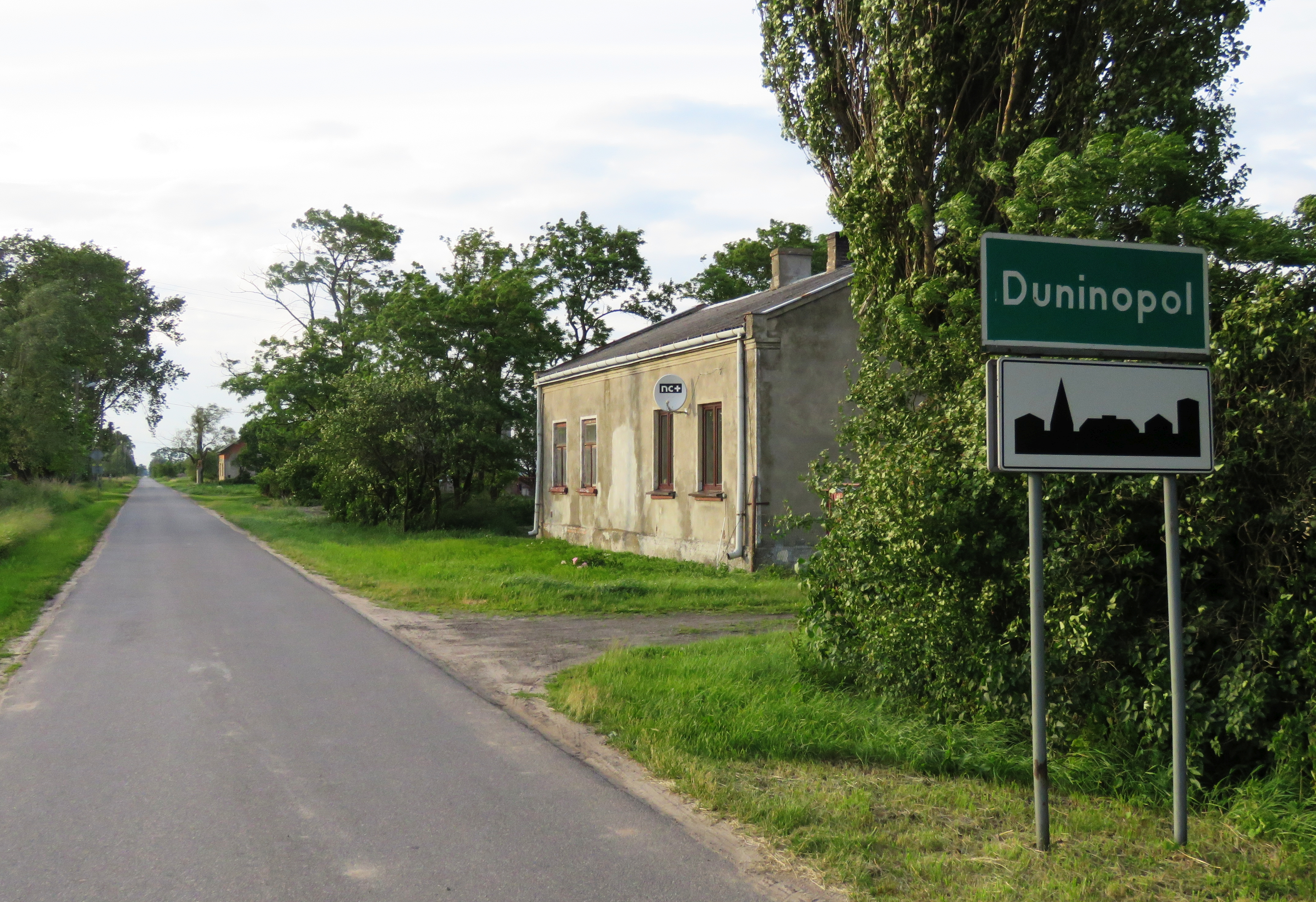 Duninopol